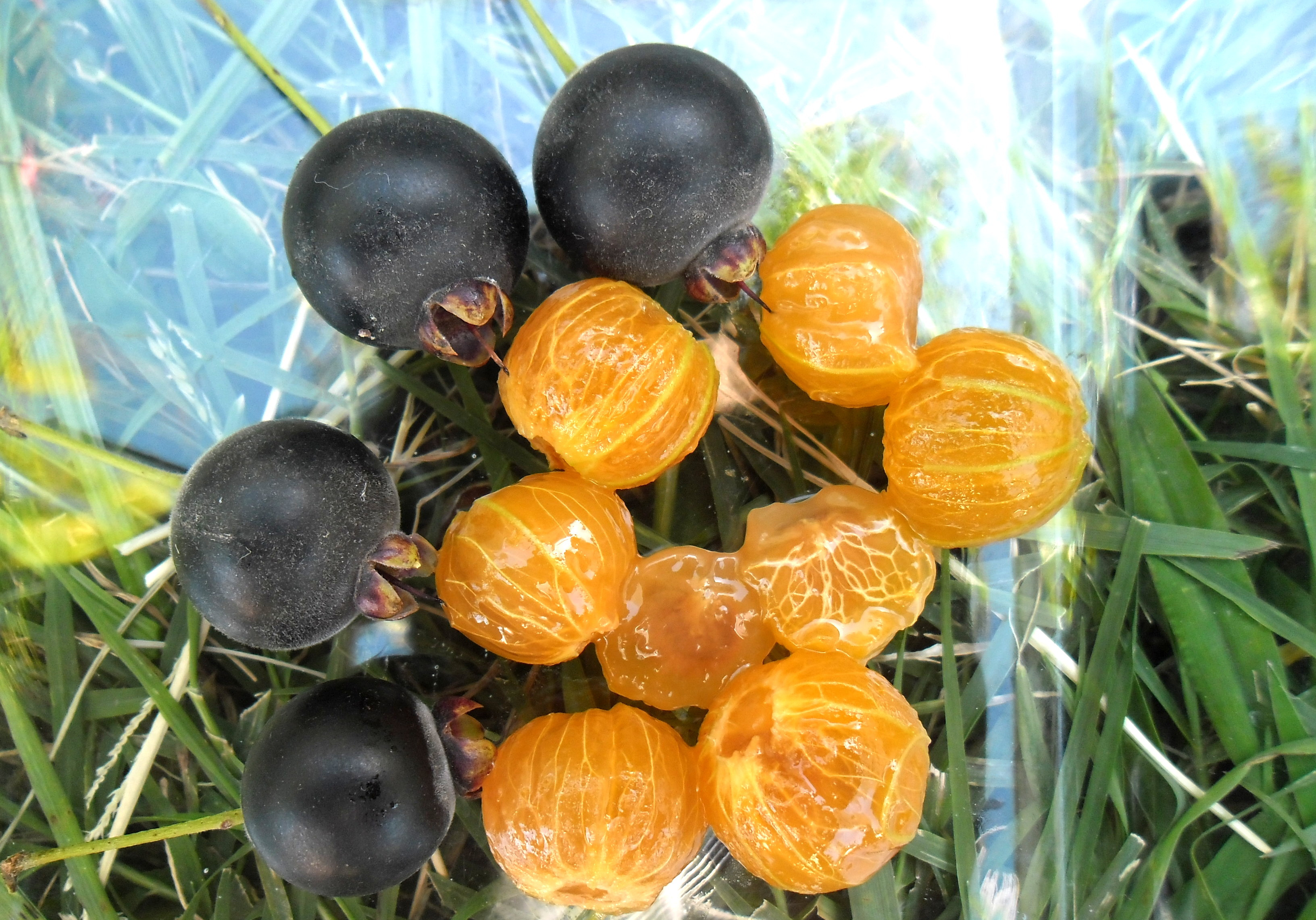 Frutos de Guaviyú, con y sin piel